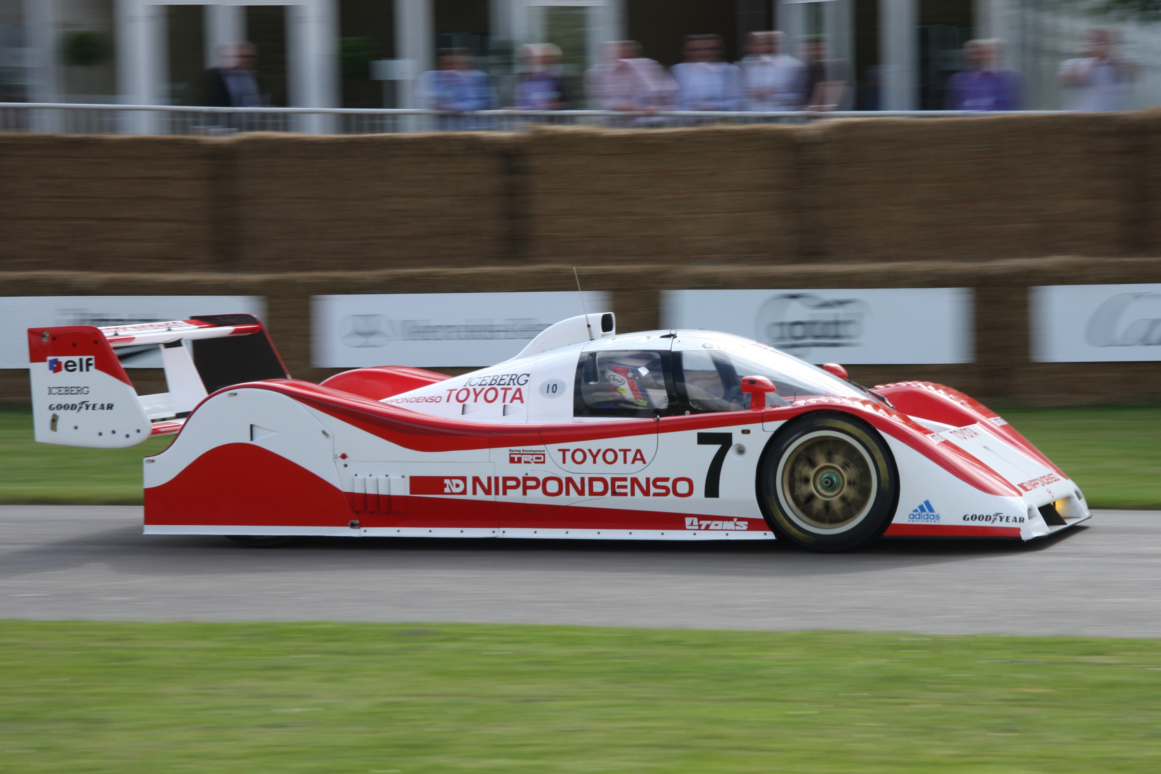 Built 1992. 3.5 litre V10